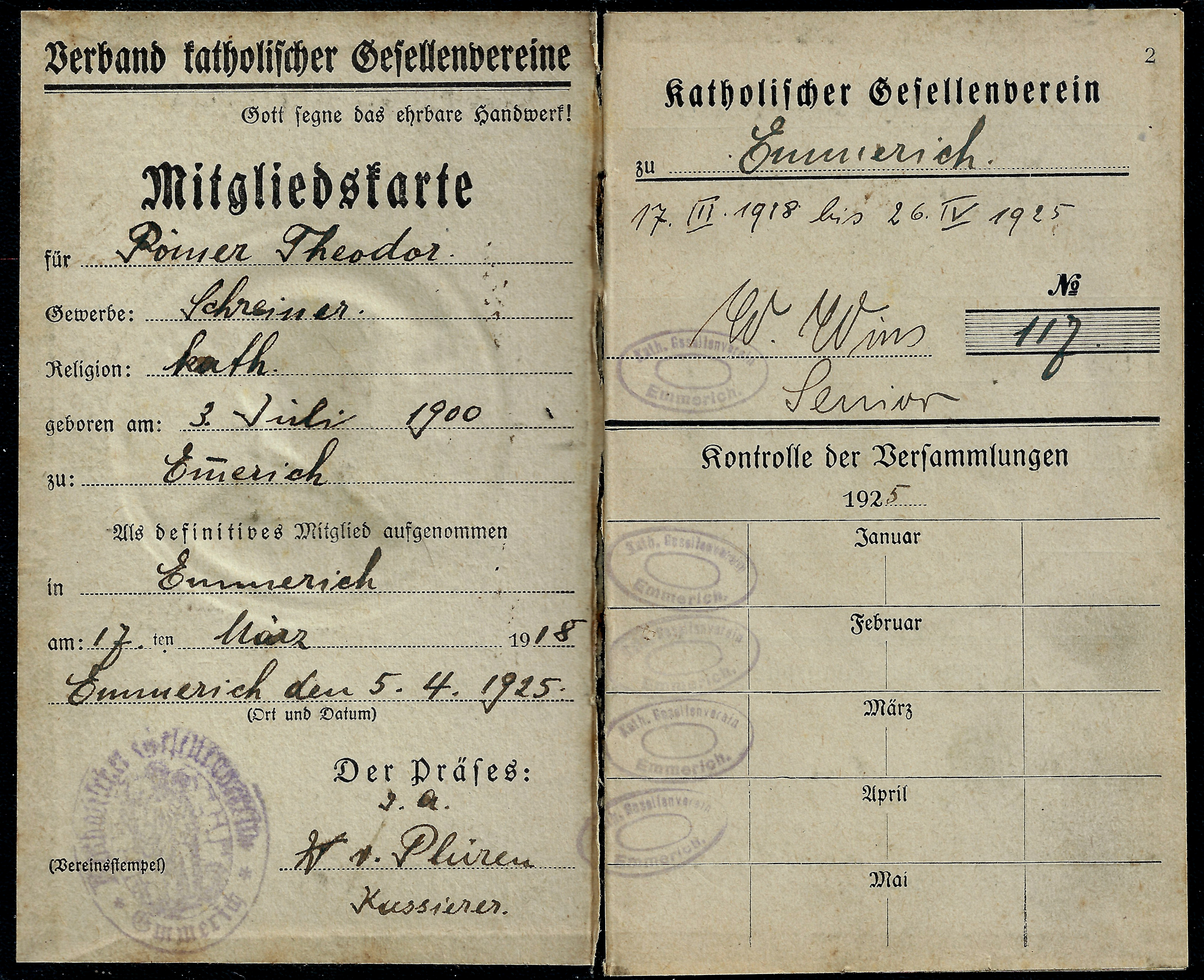 Verband katholischer Gesellenvereine - Mitgliedskarte 1925 - Seite 1-2